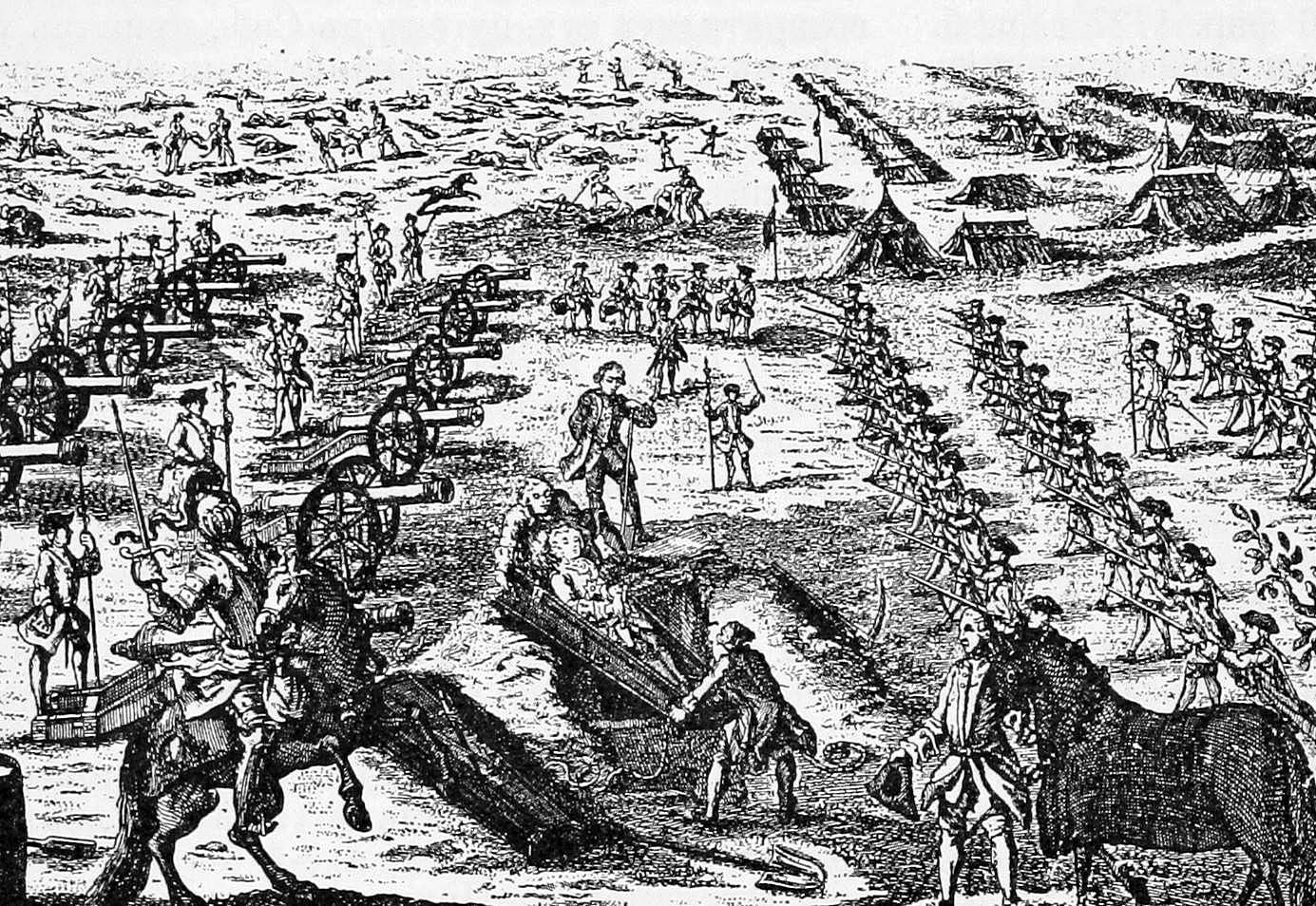 Погребение генерала Кейта (рисунок с немецкой гравюры). Это изображение было использовано для иллюстрирования статьи «Кейт, Яков» опубликованной в двенадцатом томе «Военной энциклопедии», который был издан книгоиздательским товариществом И. Д. Сытина в 1913 году в столице Российской империи городе Санкт-Петербурге. Более подробное описание к этой картинке можно прочесть в указанной выше статье.